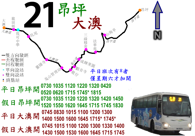 中文（香港）: 新大嶼山巴士21路線的走線圖